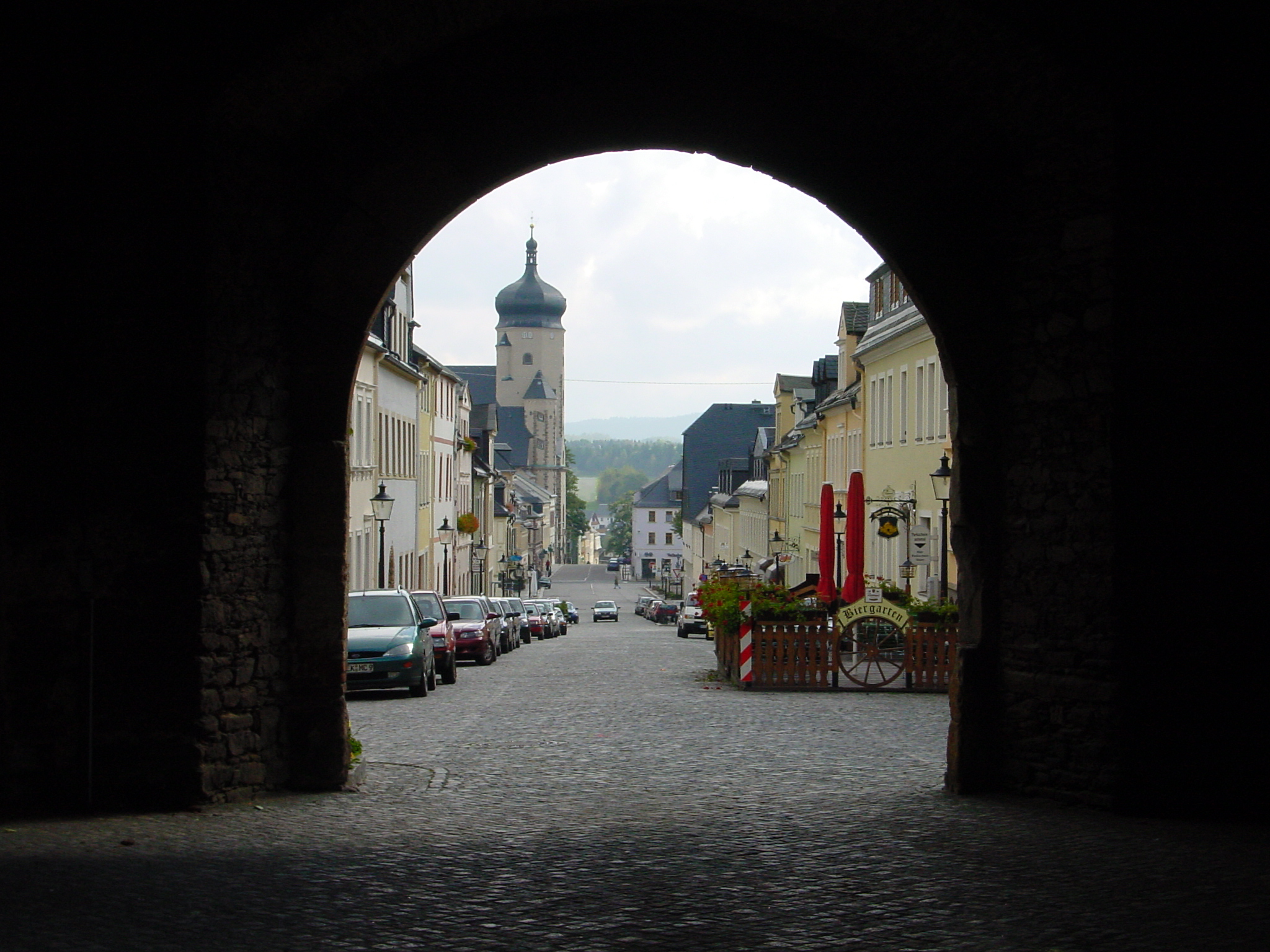 Blick durchs Zschopauer Tor in Marienberg auf die Stadtkirche St.Marien 29.09.2002(Foto by geme)